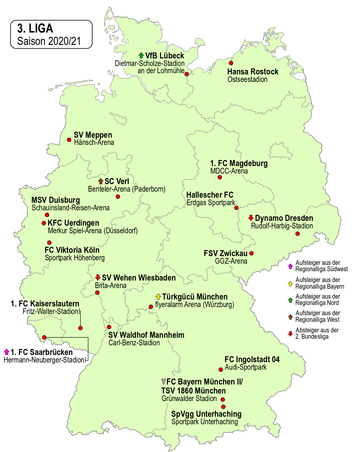 Karte der Vereine der 3. Fussball-Liga 2020/21